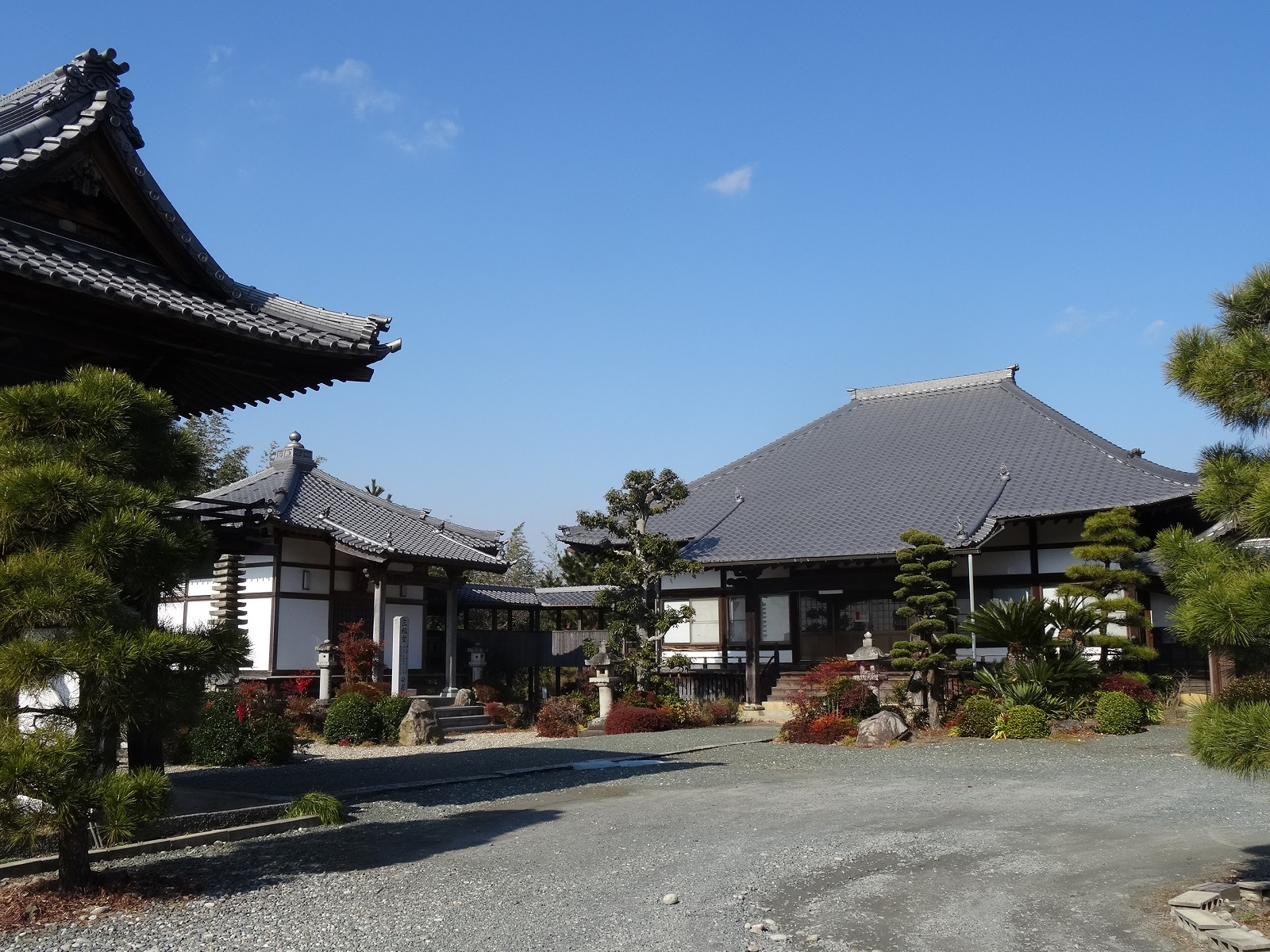 松明院（岡崎市細川町）